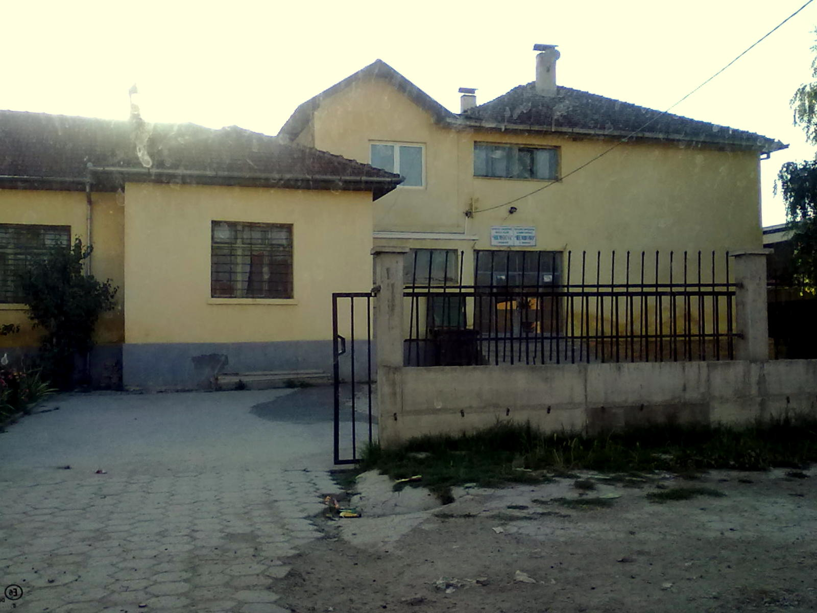 ОУ „Шемшево“ во Шемшево, тетовско